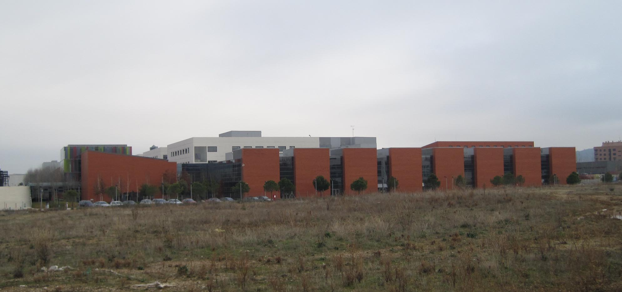 Vista parcial del Hospital Río Hortega, en Valladolid (España).